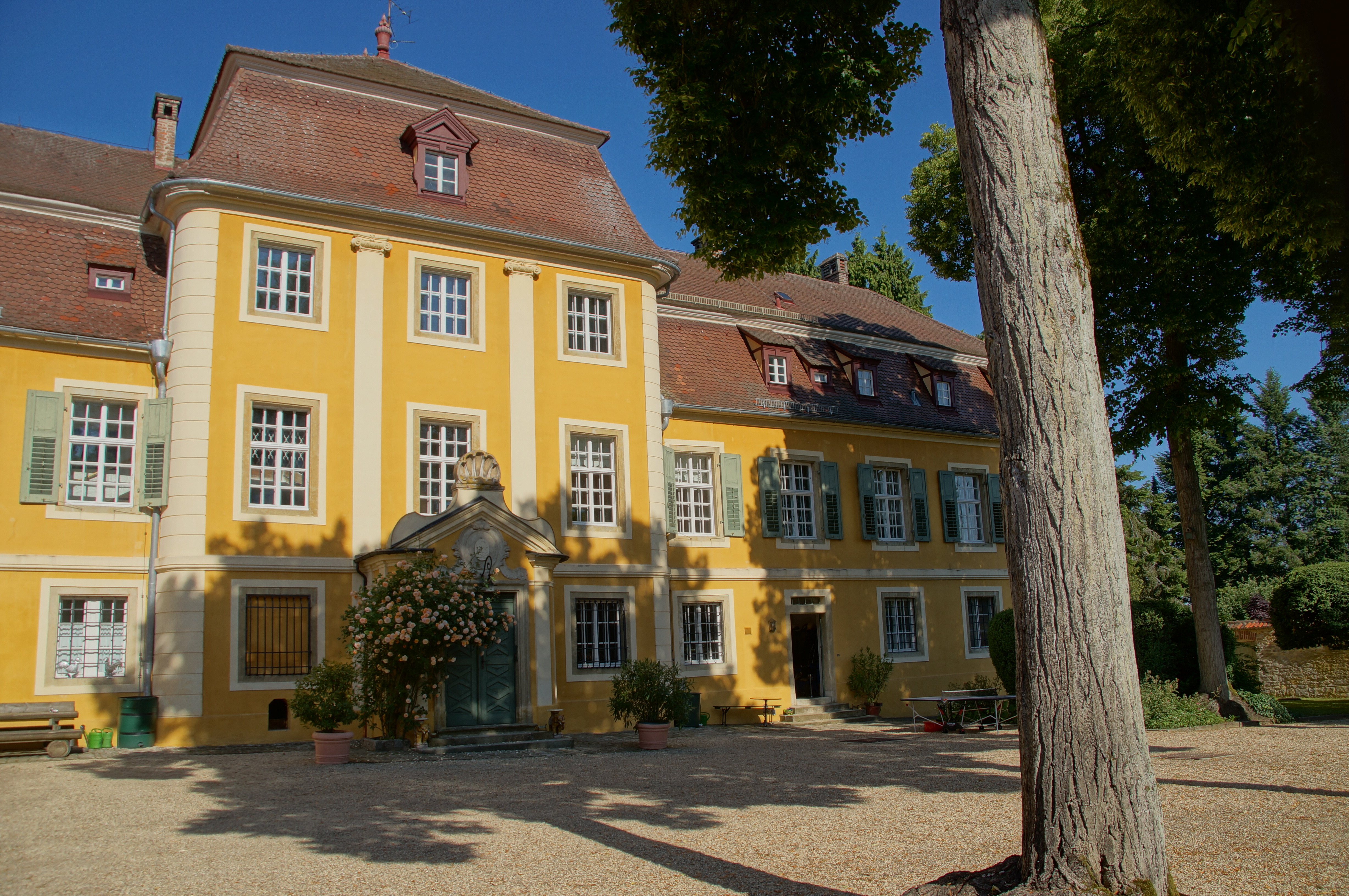 Schloss Höfling, zweigeschossiger Mansarddachbau mit Halbwalm, dreigeschossigem Mittelrisalit, Vorzeichen und Putzgliederungen, spätbarock, 1750; Nebengebäude mit Remise, eingeschossiger und traufständiger Satteldachbau mit Kniestock und neubarocken Putzgliederungen, um 1900; Hofummauerung, Bruchsteinmauer mit rustizierten Portalen und Aufsätzen, Ende 18. Jahrhundert, teilweise modern erweitert; Parkfiguren, mythologische Gestalten, Kalkstein, wohl 18. Jahrhundert